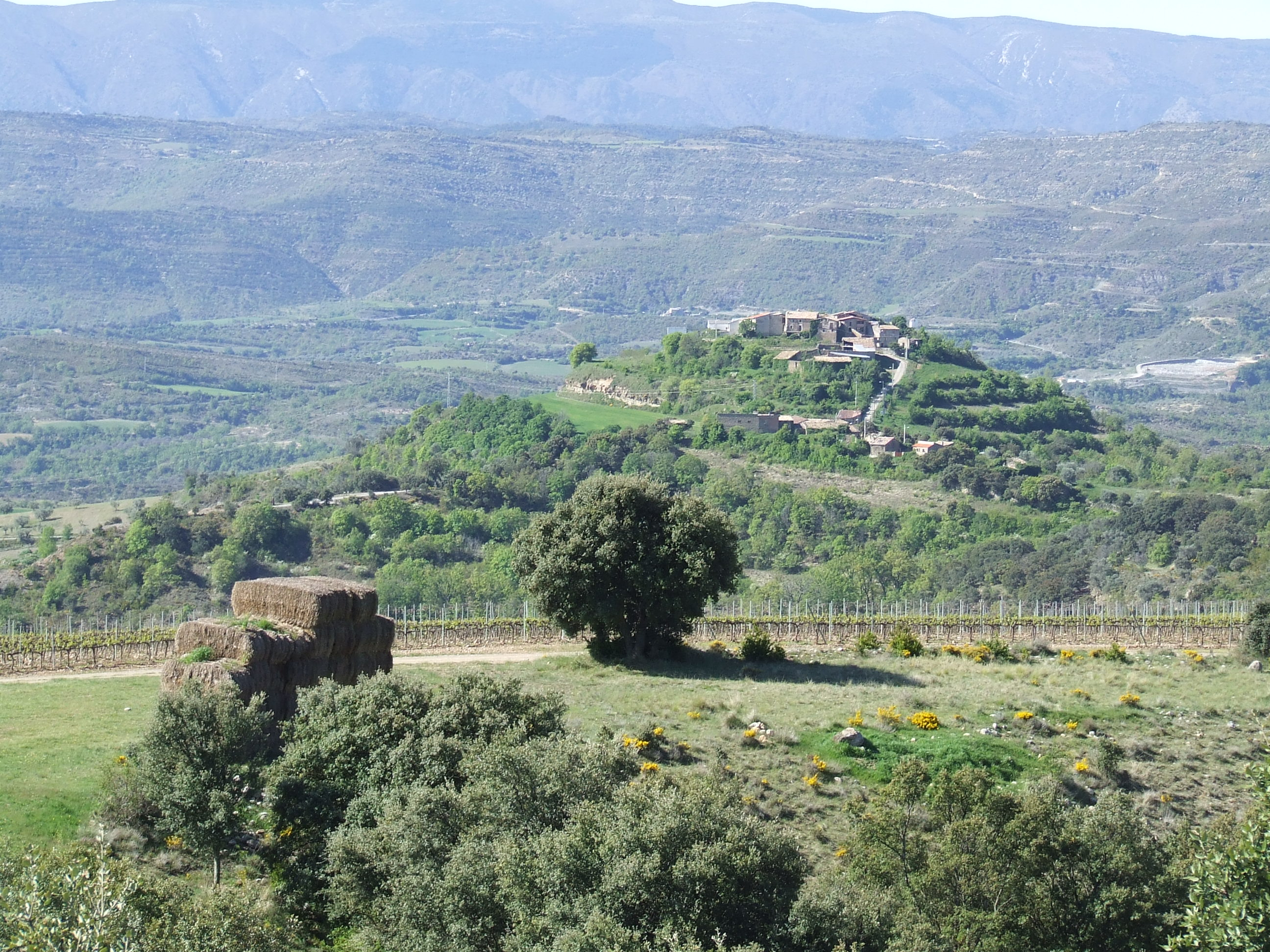 Vista del poble de Sant Adrià (Gurp de la Conca, Tremp, Pallars Jussà)